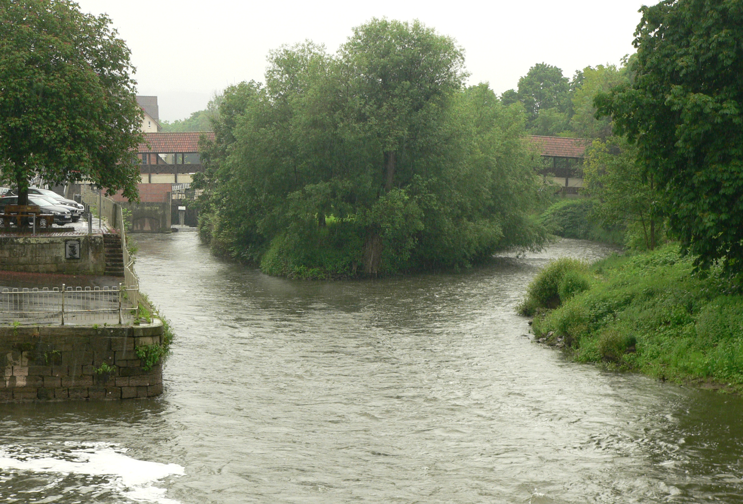 Eselswerder in Hann. Münden